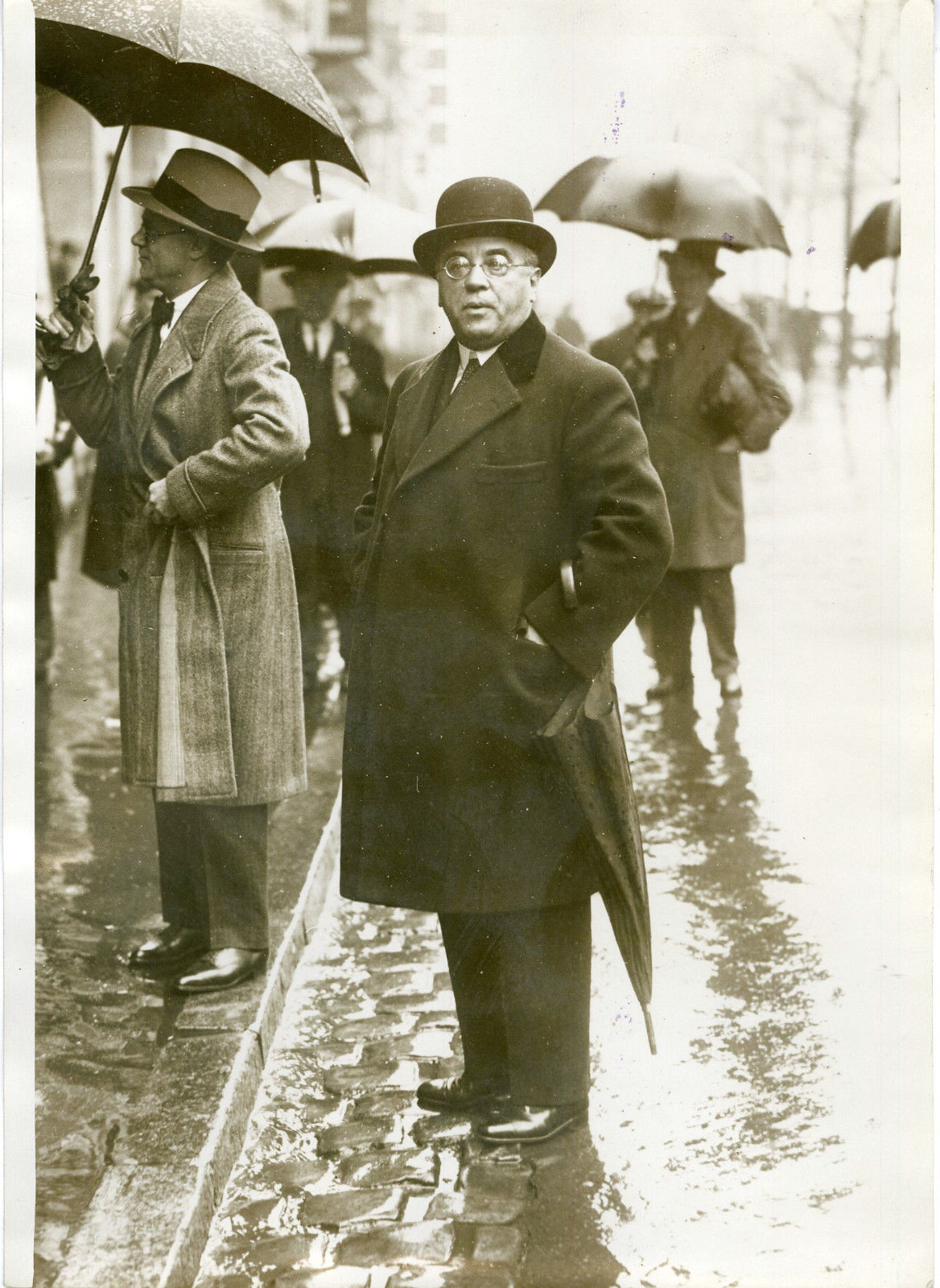 Albert Sarraut, photographie de Georges Devred, agence Rol, 1931. Inscription au verso : Paris 5 novembre 1931. Ouverture du 28ème Congrès du Parti Républicain Radical et Radical Socialiste à la Salle Wagram. Arrivée de Monsieur Albert Sarraut, ancien Ministre.